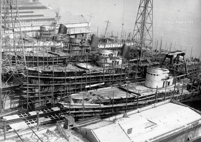 L’Altair e le gemelle Andromeda, Antares ed Aldebaran in costruzione nel 1936 (Archivio Alinari